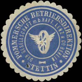 Siegelmarke Pommersche Betriebsdirektion Stettin